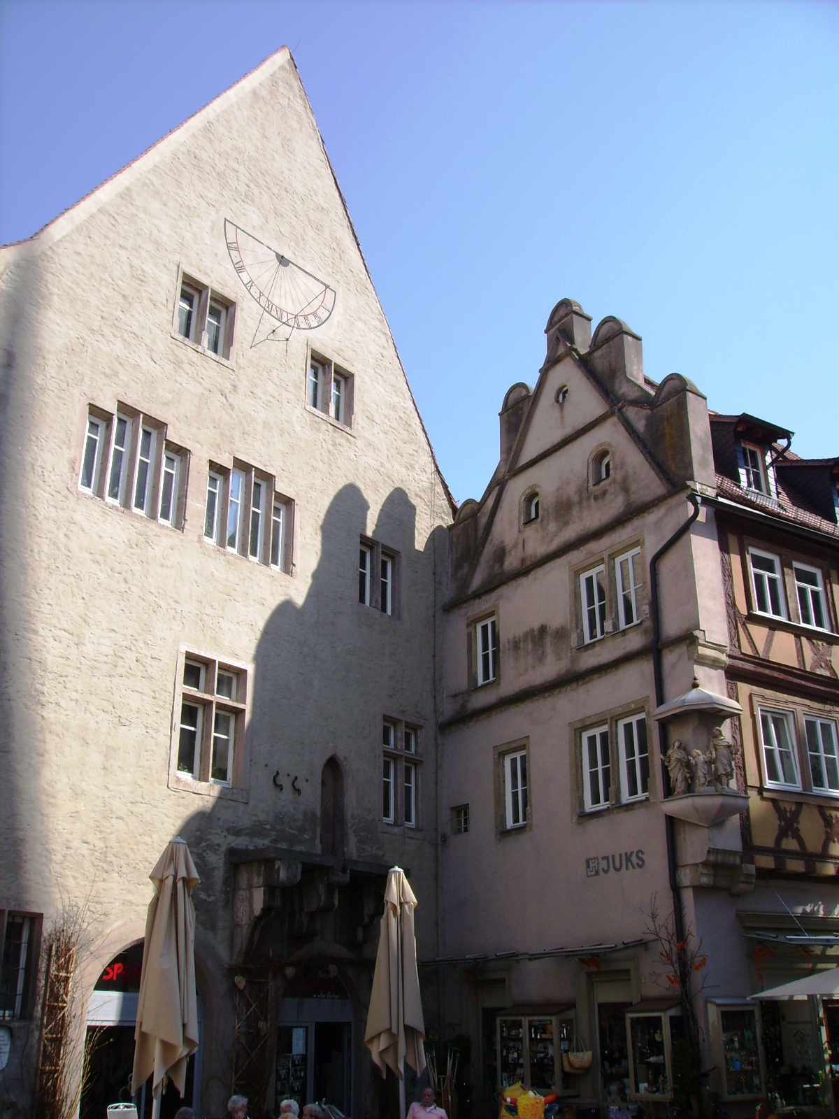 Ochsenfurt. Altes Rathaus mit Pranger.